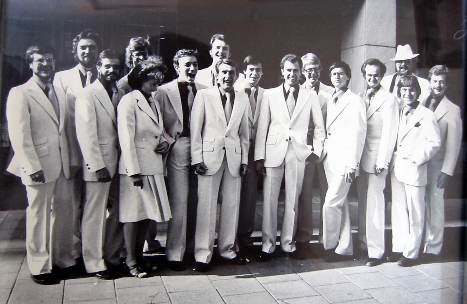 Pigge Larsson, Anders Albien, Staffan Nilsson, Sune Larsson, Eva Leire, Pelle Johnsson, Olle Hydbom, Stellan Sundahl, Kryddan Peterson, Sigge Barsby, Totto Modér, Peppe Runnerström, JP, Christian W Jansson, Julius Malmsröm, Peter Kullving